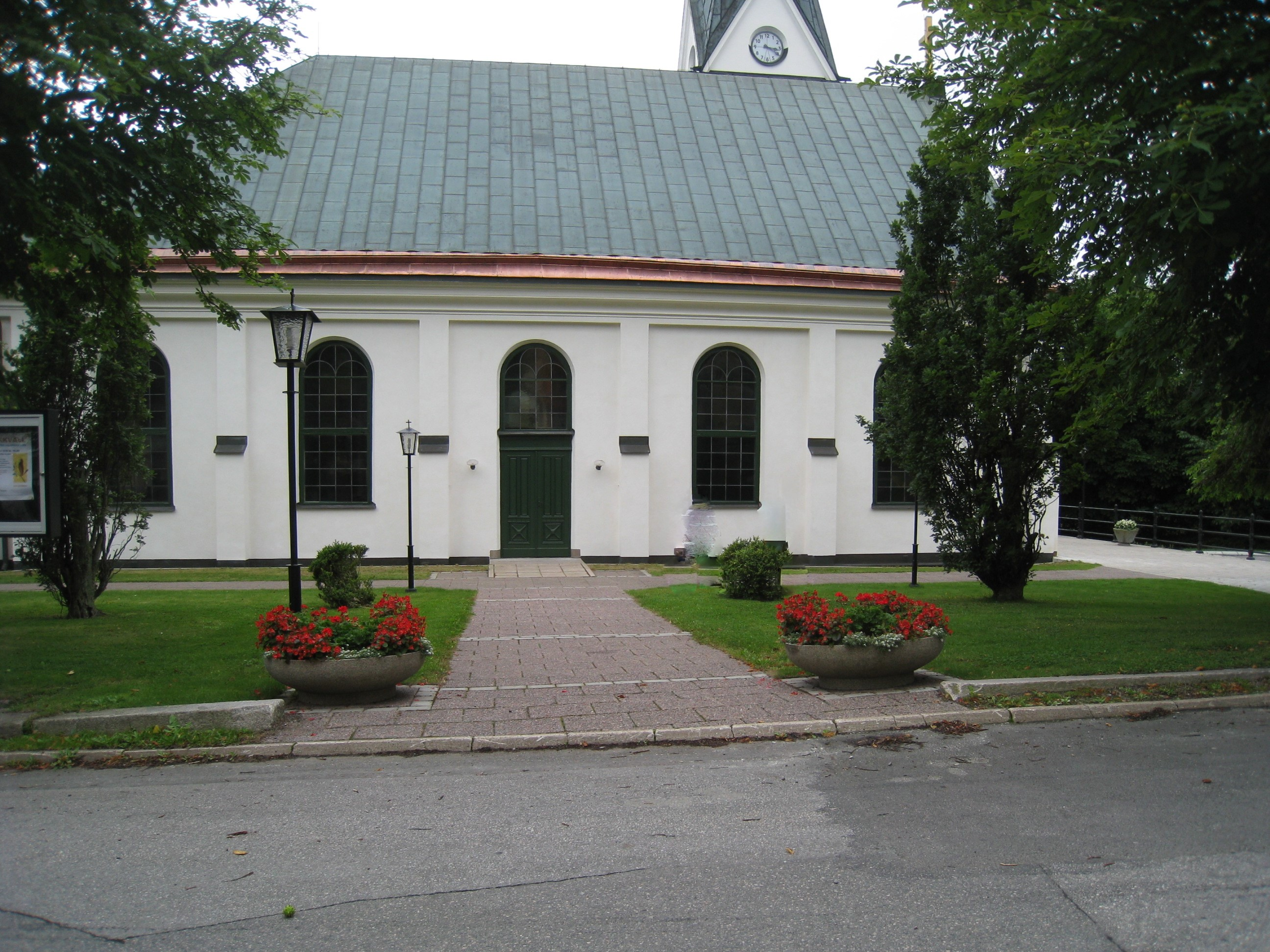 Valdemarsviks kyrka, Valdemarsvik, Östergötland.